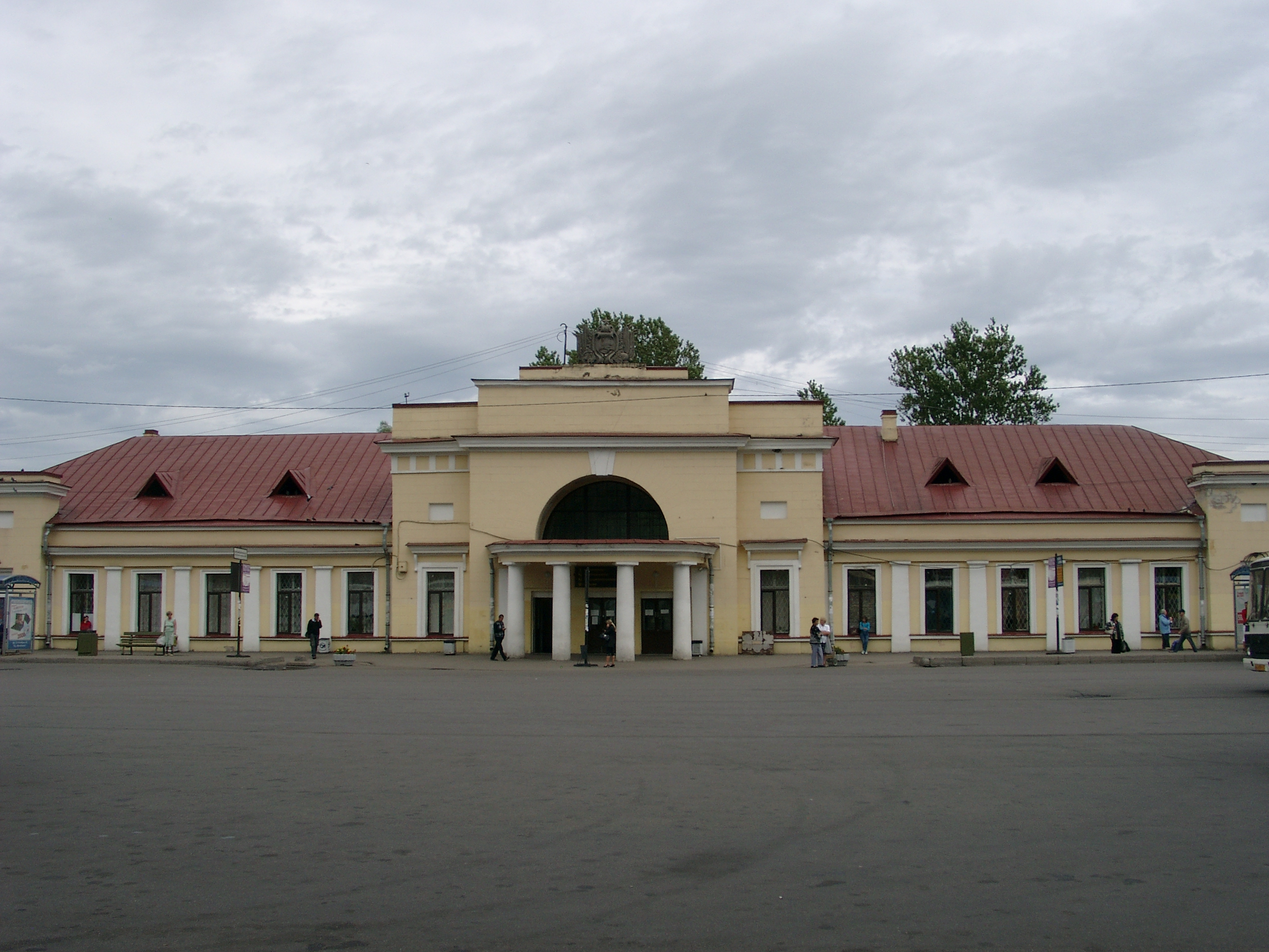 Станция Гатчина Варшавская. Здание вокзала в 2010 году. Вид с привокзальной площади.